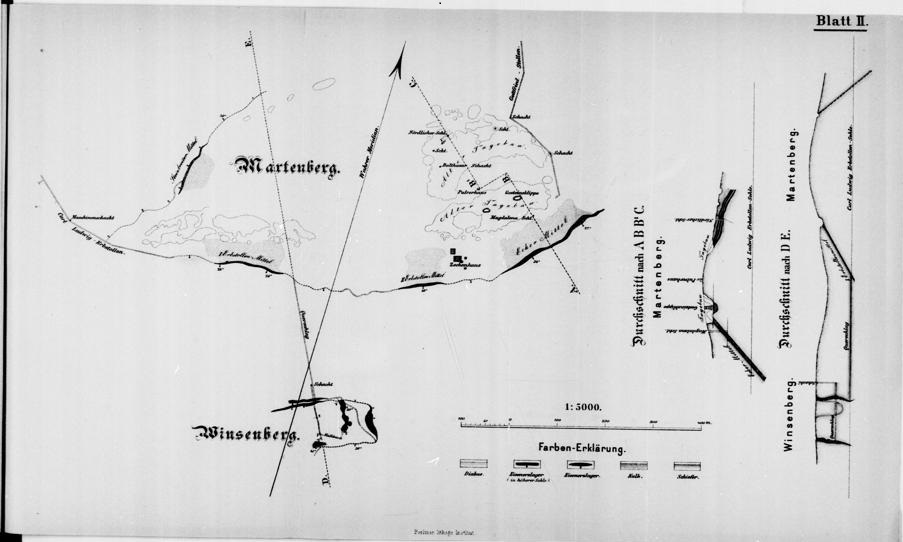 Grube Martenberg (bei Adorf, heute Gemeinde Diemelsee)